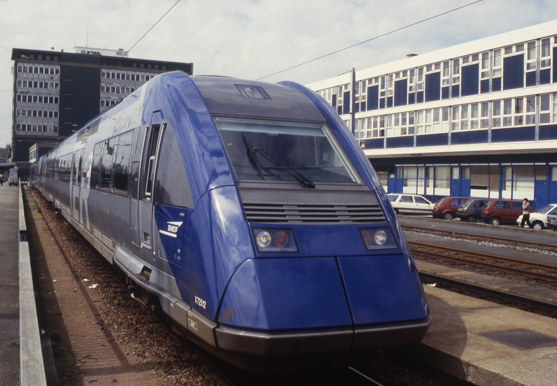 Dieseltreinstel in Nantes